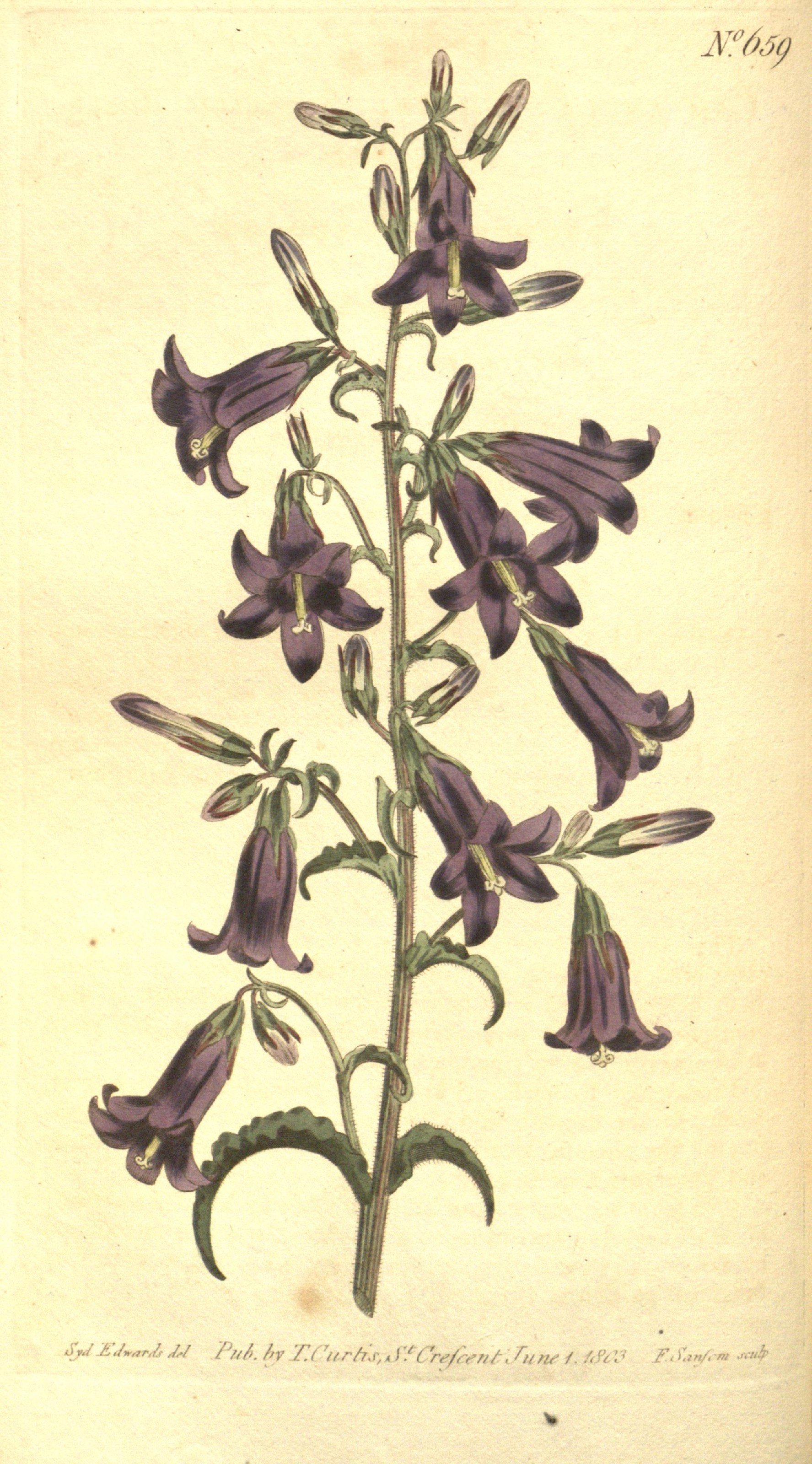 N°M h Ta ur/ 7 :,,,r//